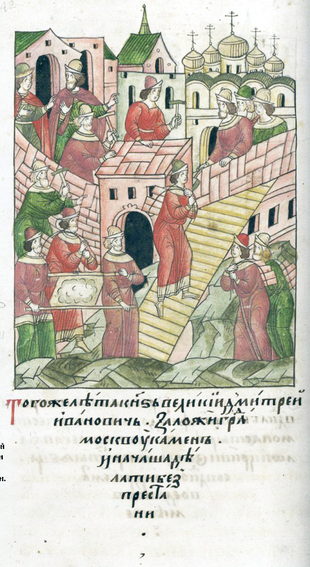 ЛИЦЕВОЙ ЛЕТОПИСНЫЙ СВОД В том же году великий князь Дмитрий Иванович заложил каменный город Москву, и началось его строительство.